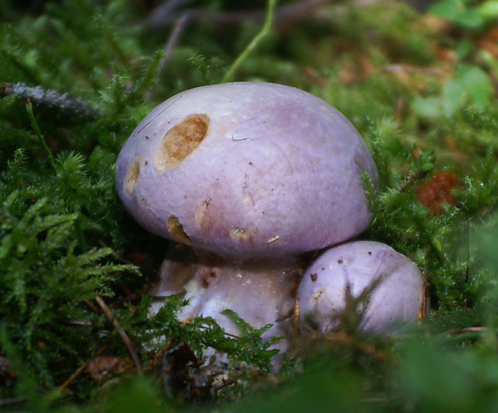 Lila Dickfuß “Cortinarius traganus” *** [1] Lila Dickfuß Cortinarius traganus * Merkmale: 4 - 10 cm breiter Hut der erst kugelig, später gewölbt ist. Im Alter verblasst seine Farbe. Der Stiel ist in der Basis keulig. * Hutfarbe: Lila. * Lamellen: Erst ocker, später rostbraun. * Stielfarbe: Lila * Fleischfarbe: Safran. * Vorkommen: Fichtenwald. * Zeitraum: August bis November. * Verwechslungsmöglichkeiten: Violetter Schleierling. * Verwendbarkeit: Giftig * Besonderheiten: Unangenehmer Geruch.